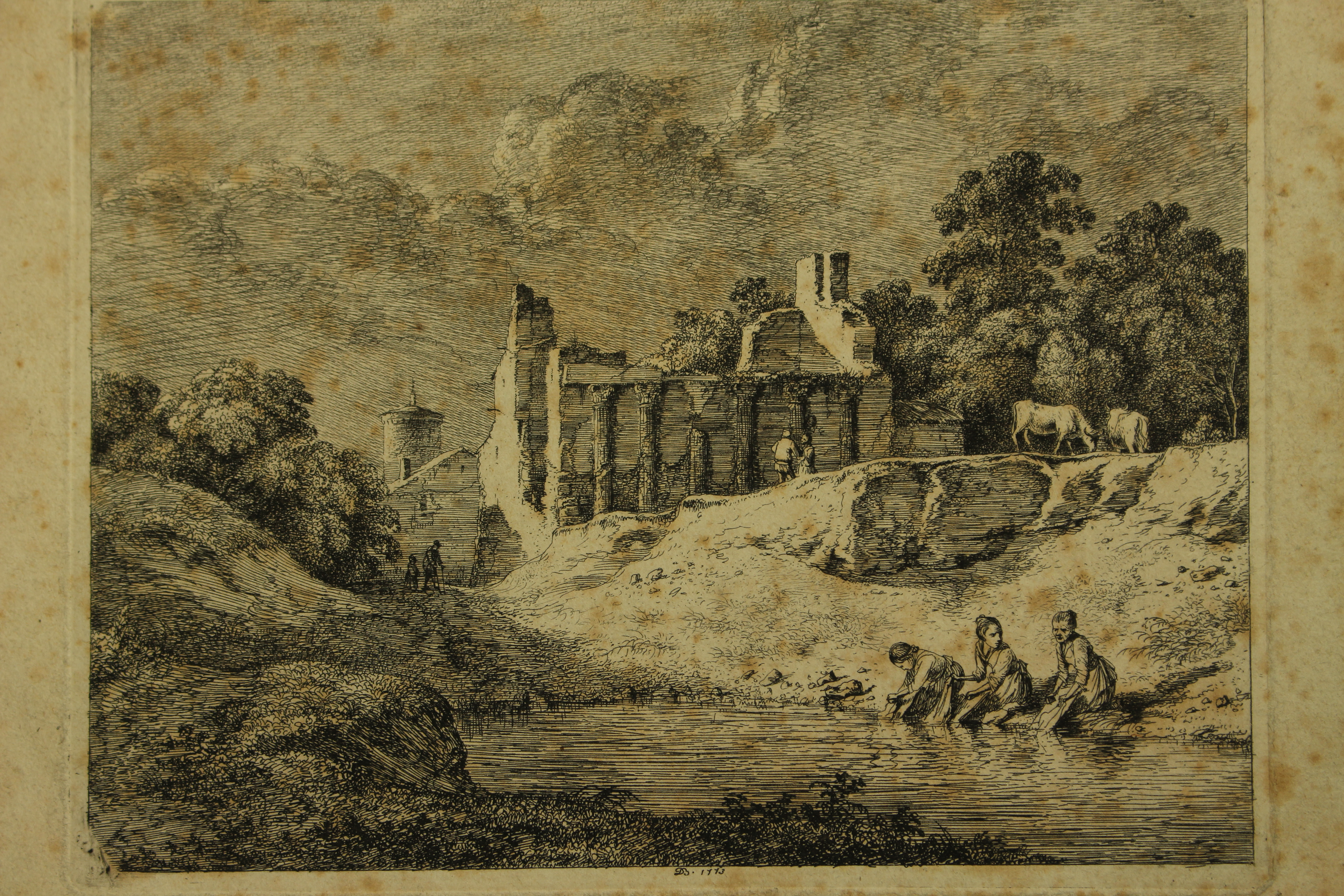 Jean-Jacques de Boissieun, Les petites laveuses, estampe ; Musée des Hospices civils de Lyon ; 2007.0.1347.M 116